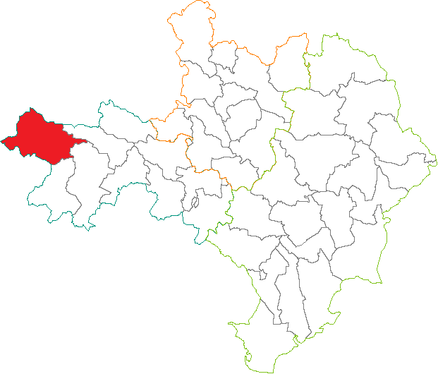 Situation du canton dans le département du Gard (France)